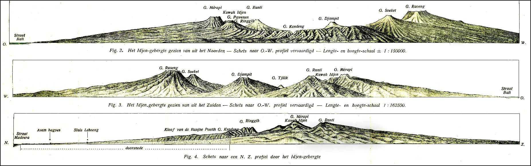 Ansichten des Ijen-Gebirges aus verschiedenen Himmelsrichtungen